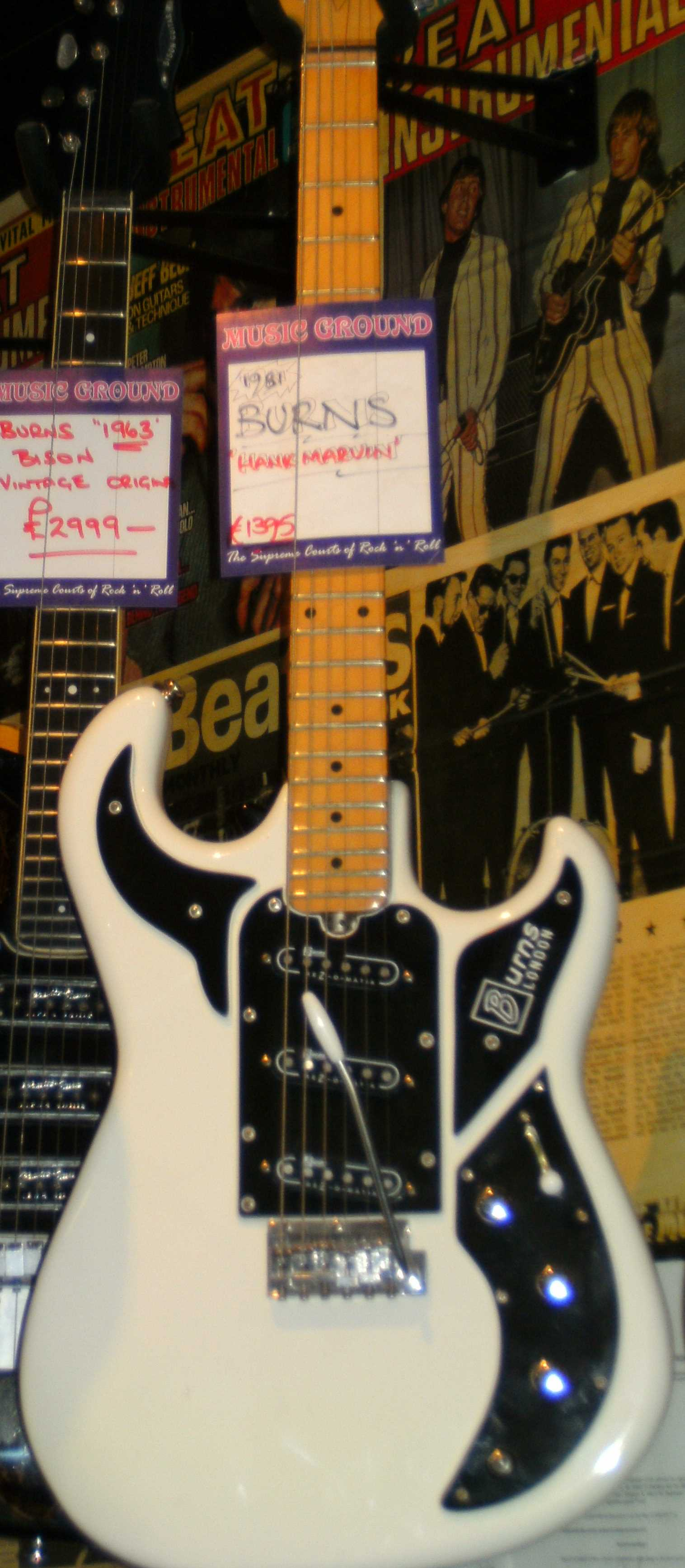 "Sparversion" der Marvin 70er bzw. 80er. Gitrarrenshop in London. Herstellungszeitpunkt fraglich, allerdings dürfte diese Gitarre aus der Zeit der späten 70er / Anfang der 80er stammen (Namensstreit mit Fender !)